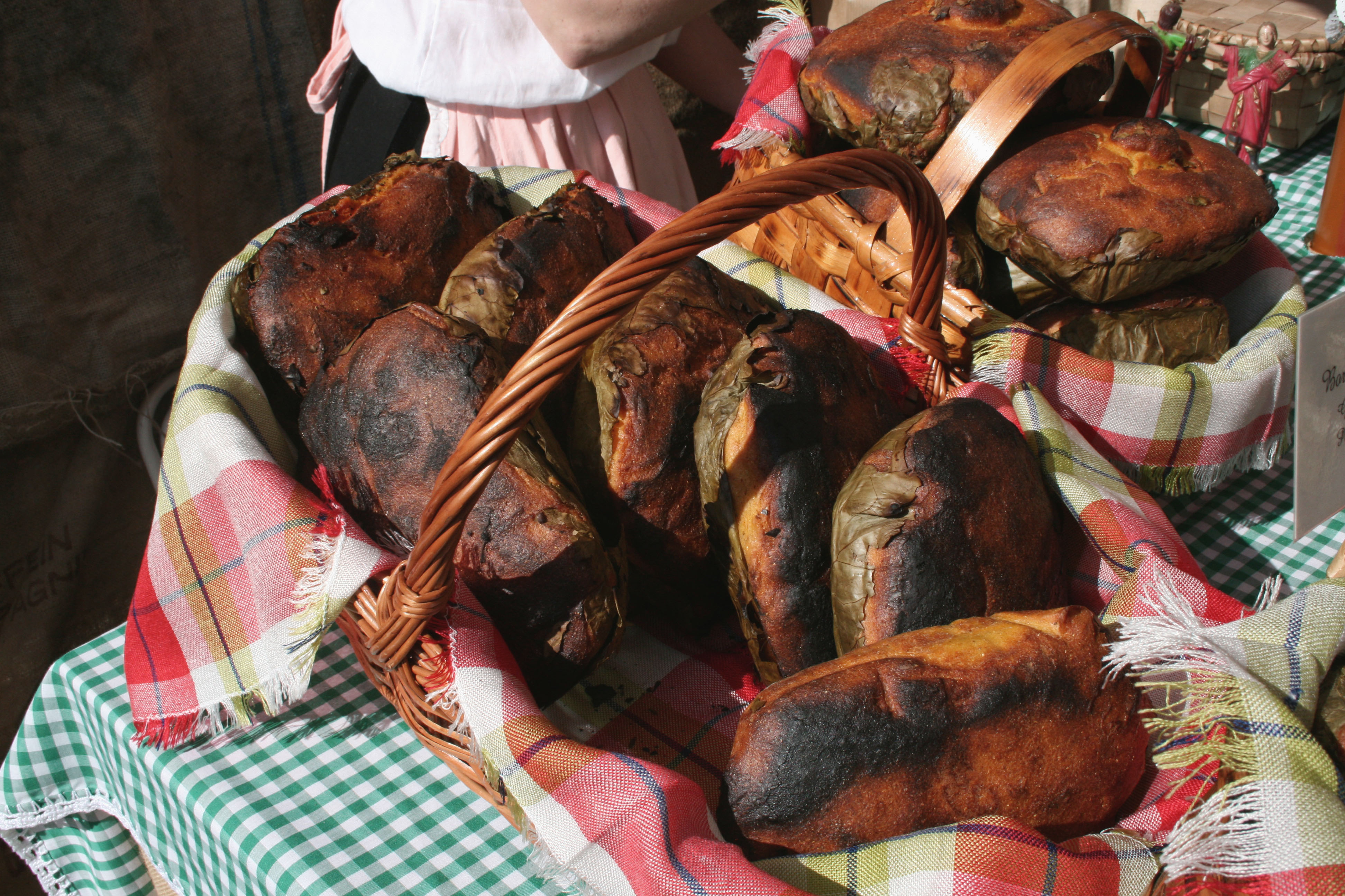 Boroña (Asturiana) Pola de Lena